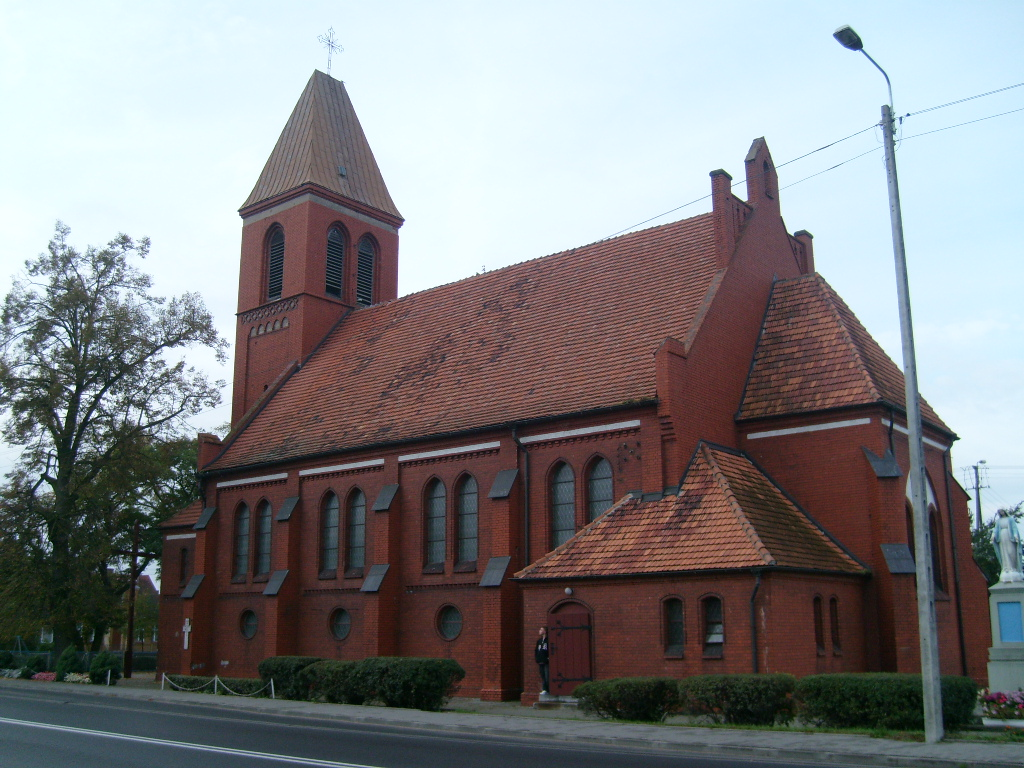 Rynarzewo - dawny kościół ewangelicki, obecnie filialny rzymskokatolicki pw. św. Stanisława Biskupa